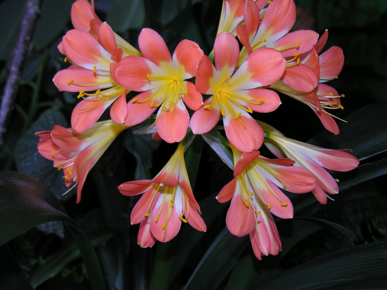 Klivija (Clivia miniarta) Šeima. Amariliniai (Amaryllidaceae) Foto: Algirdas, 2006 m. balandžio 20 d., darbo kabinete